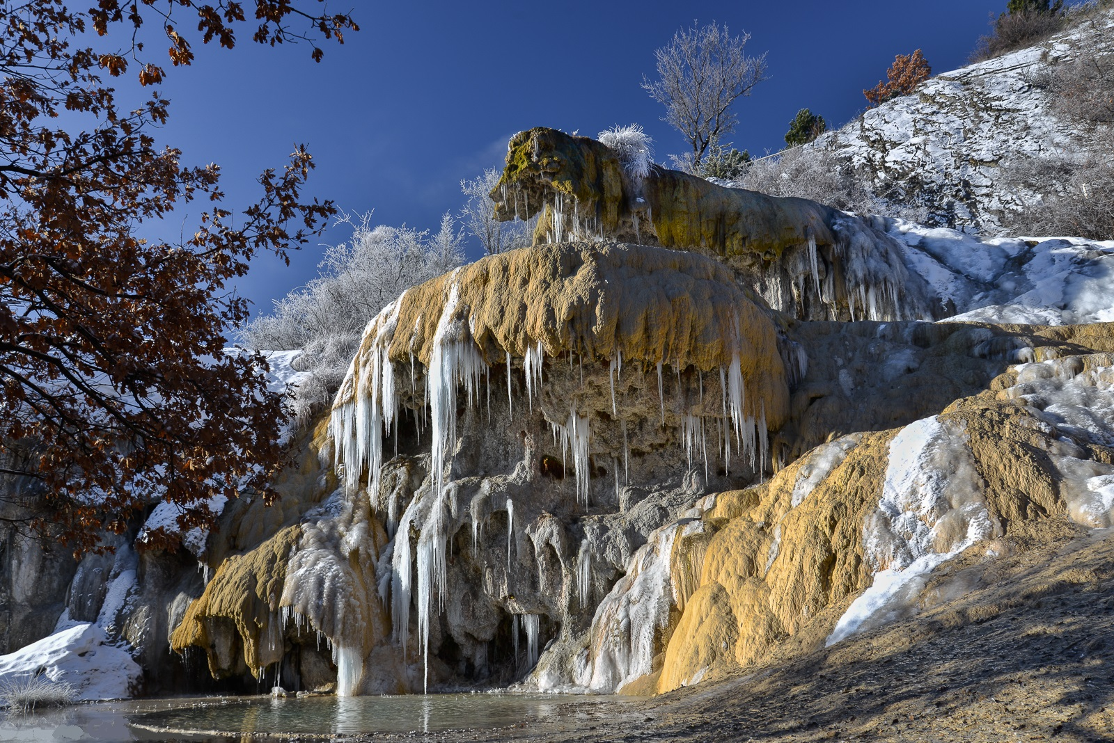 La fontaine de Réotier et ses stalactites de glace